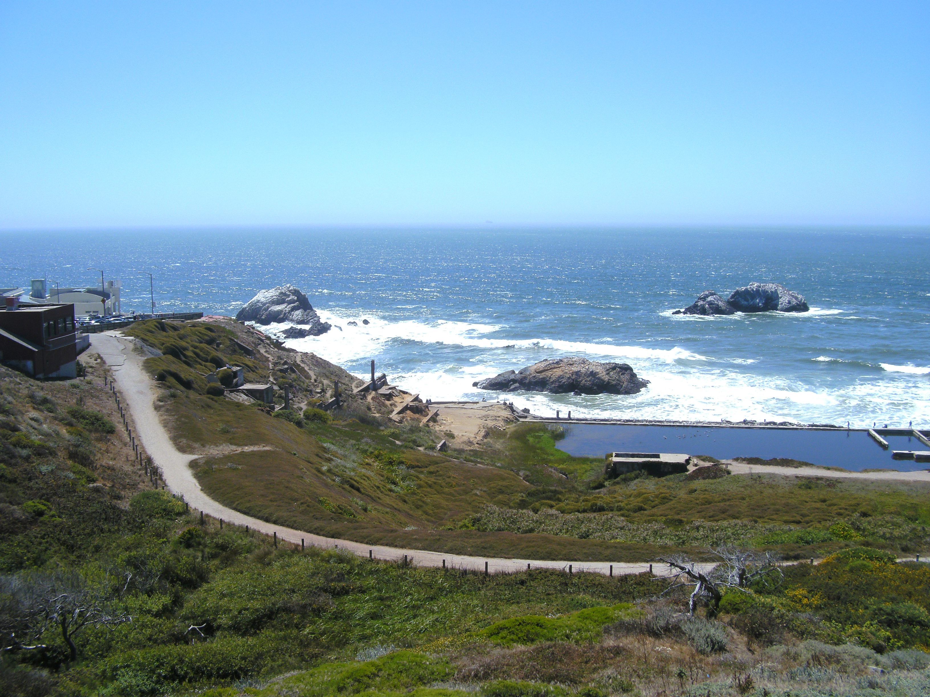 Lands End - San Francisco zum Meer